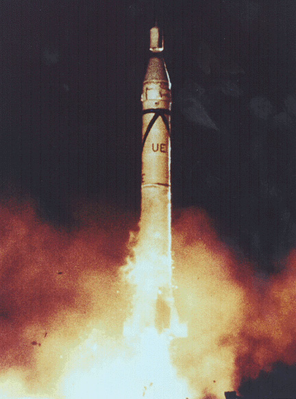 Start der Raumsonde Explorer 1 am 31. Januar 1958